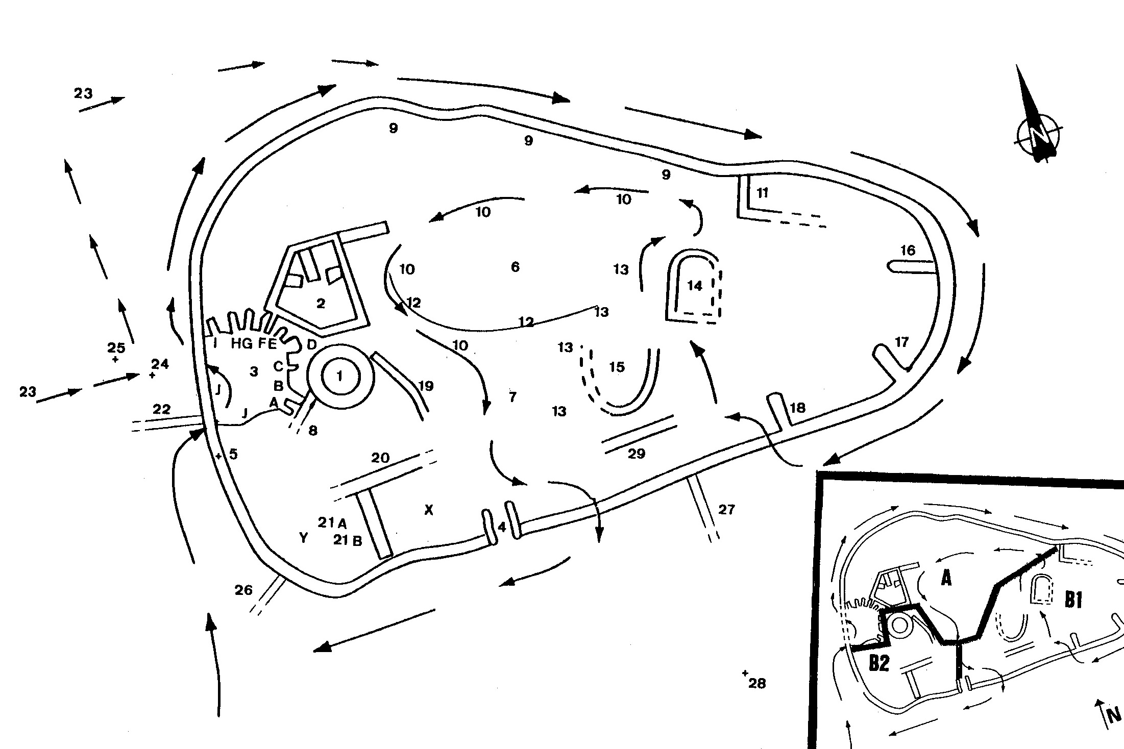 Es claper des Gegant